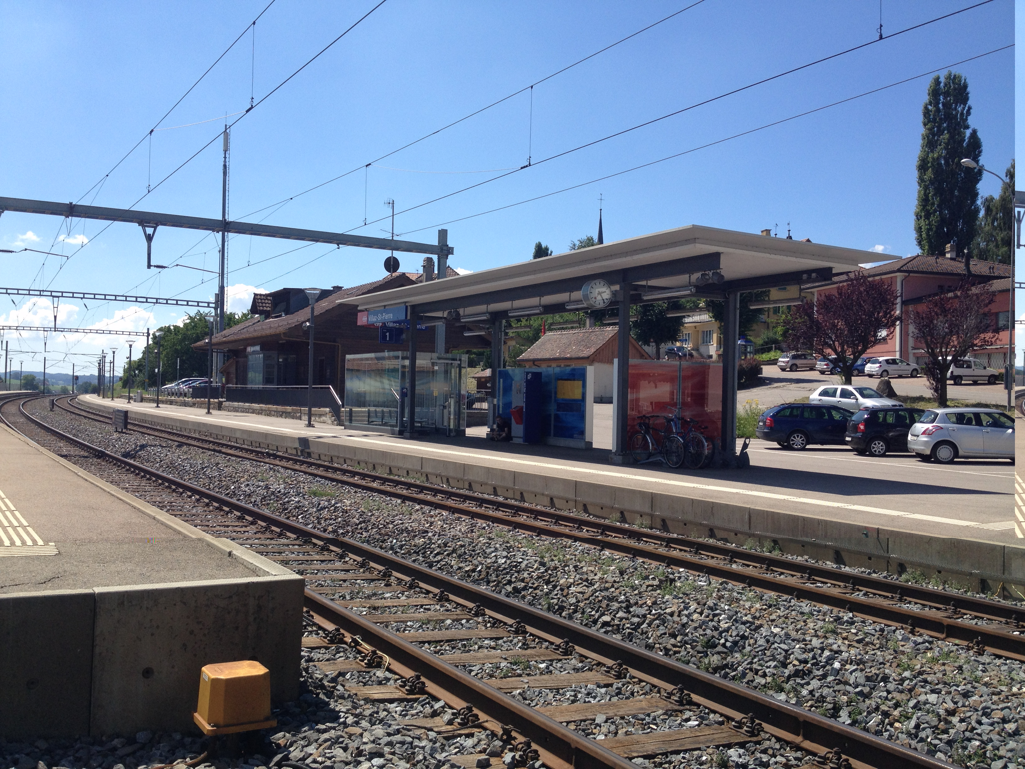 La gare de Villaz-Saint-Pierre dans le canton de Fribourg en Suisse.